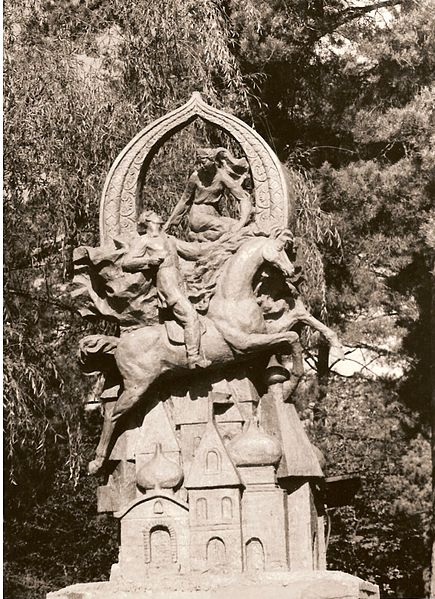 Das Zauberpferdchen, Bildhauer Josef Tabachnyk